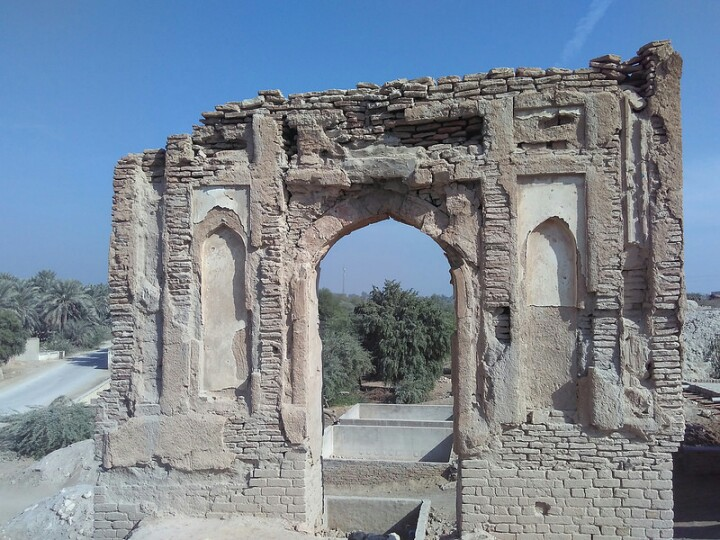 alore